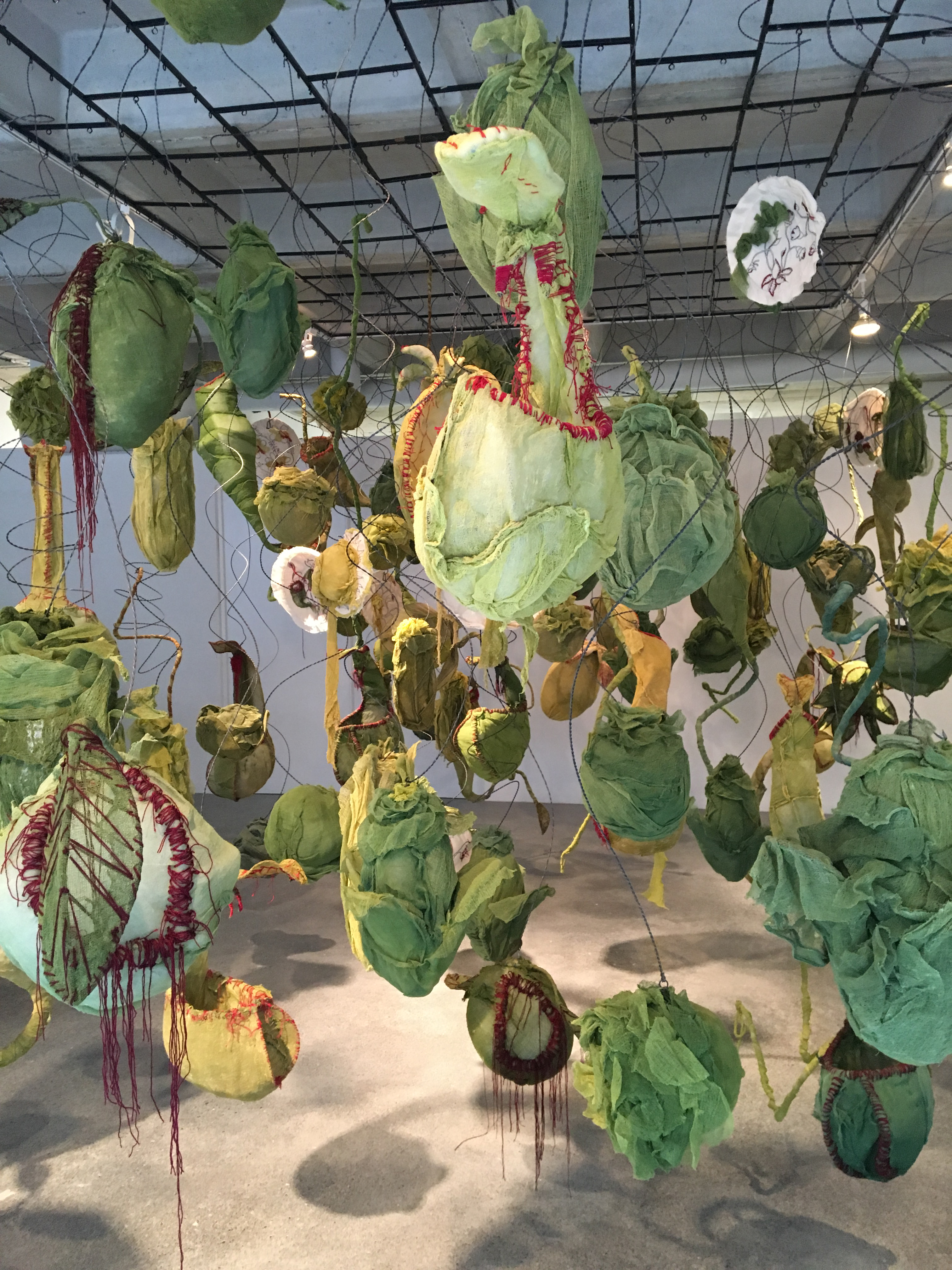 Esta es una fotografía de registro de la obra de Miriam Medrez, artista mexicana. La instalación fue montada por la propia artista en la Galería Emma Molina en la ciudad de Monterrey.